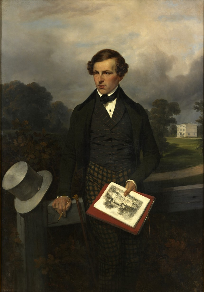 Portrait de Gustave de Maupassant